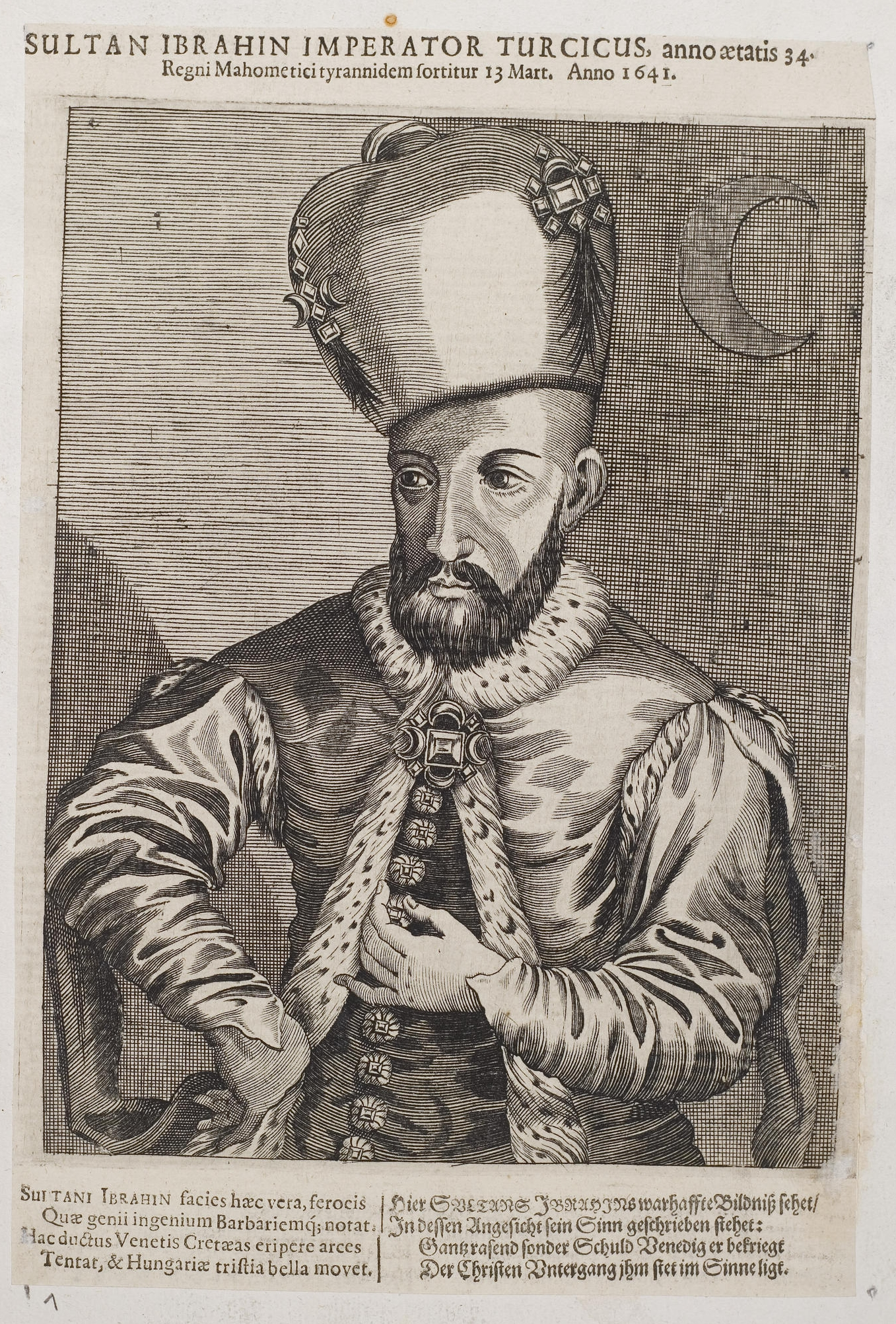 Grafik aus dem Klebeband Nr. 2 der Fürstlich Waldeckschen Hofbibliothek Arolsen Motiv: "Sultan Ibrahin Imperator Turcicus, anno aetatis 34 Regni Mahometiciti tyrannidem fortitur 13 Mart. Anno 1641" SULTANI IBRAHIN facies haec vera, ferocis Quae genii ingenium Barbariemq[ue]; notat. Hac ductus Venetis Cretaeas eripere arces Tentat, & Hungariae tristia bella movet. Hier SULTANUS IBRAHINs warhaffte Bildniß sehet/ In dessen Angesicht sein Sinn geschrieben stehet: Gantz rasend sonder Schuld Venedig er bekriegt Der Christen Vntergang jhm stet im Sinne ligt.